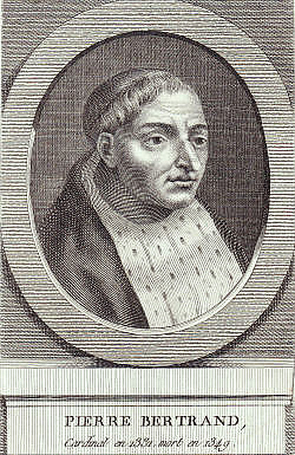 Cardinal Pierre Bertrand l'Ancien (1280-1349)